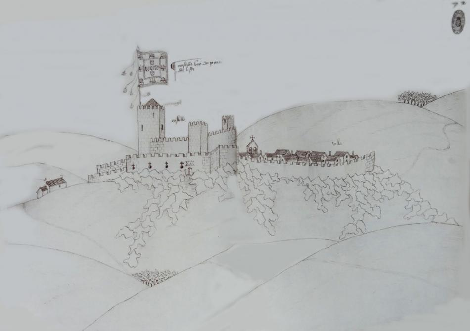 Desenho à pena sobre pergaminho, Fls. 71 v. e 72 do Livro das Fortalezas. Instituto dos Arquivos Nacionais (Casa Forte, Manuscrito 159), Torre do Tombo, Lisboa, Portugal.